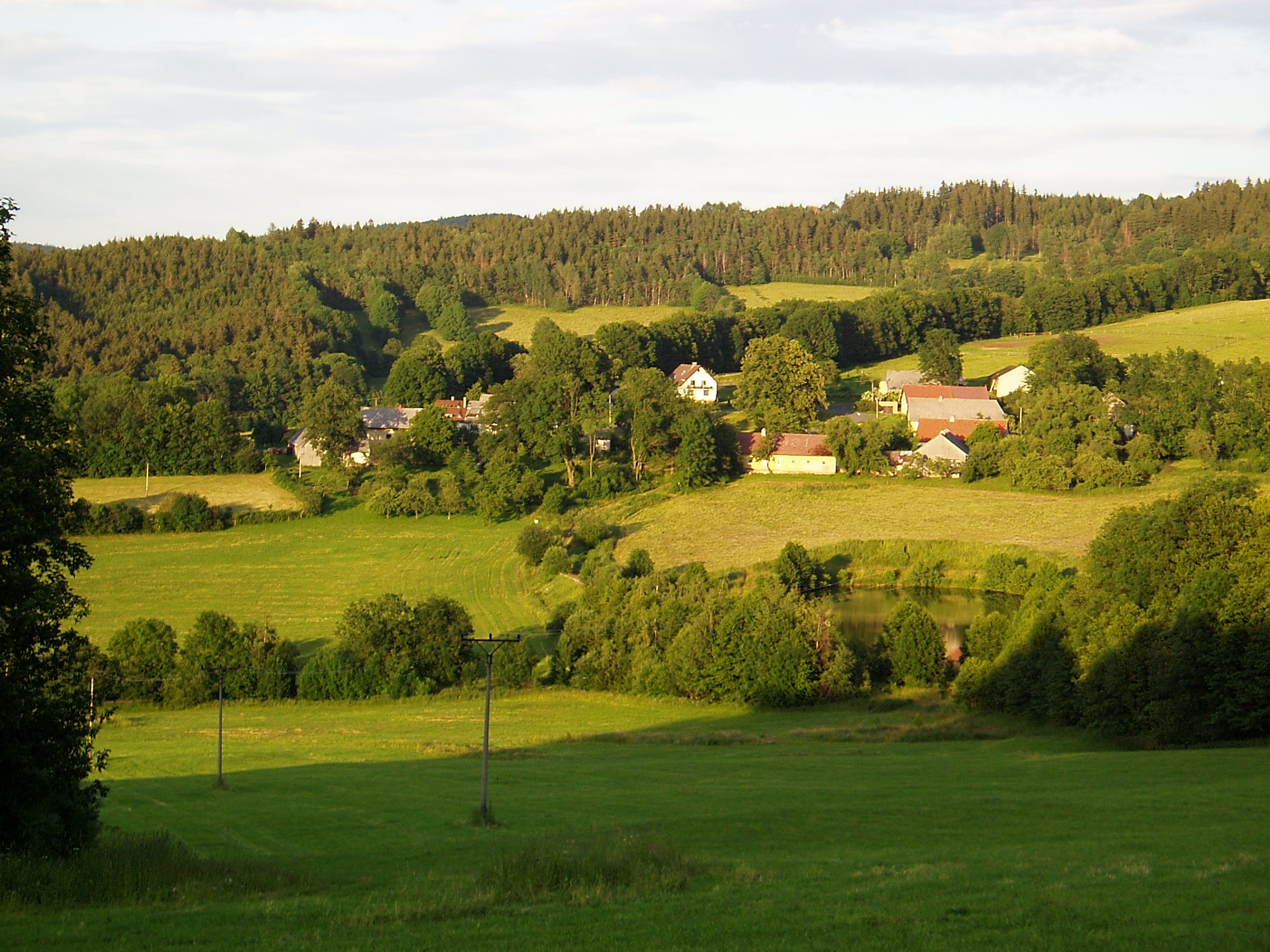 Horní Němčice